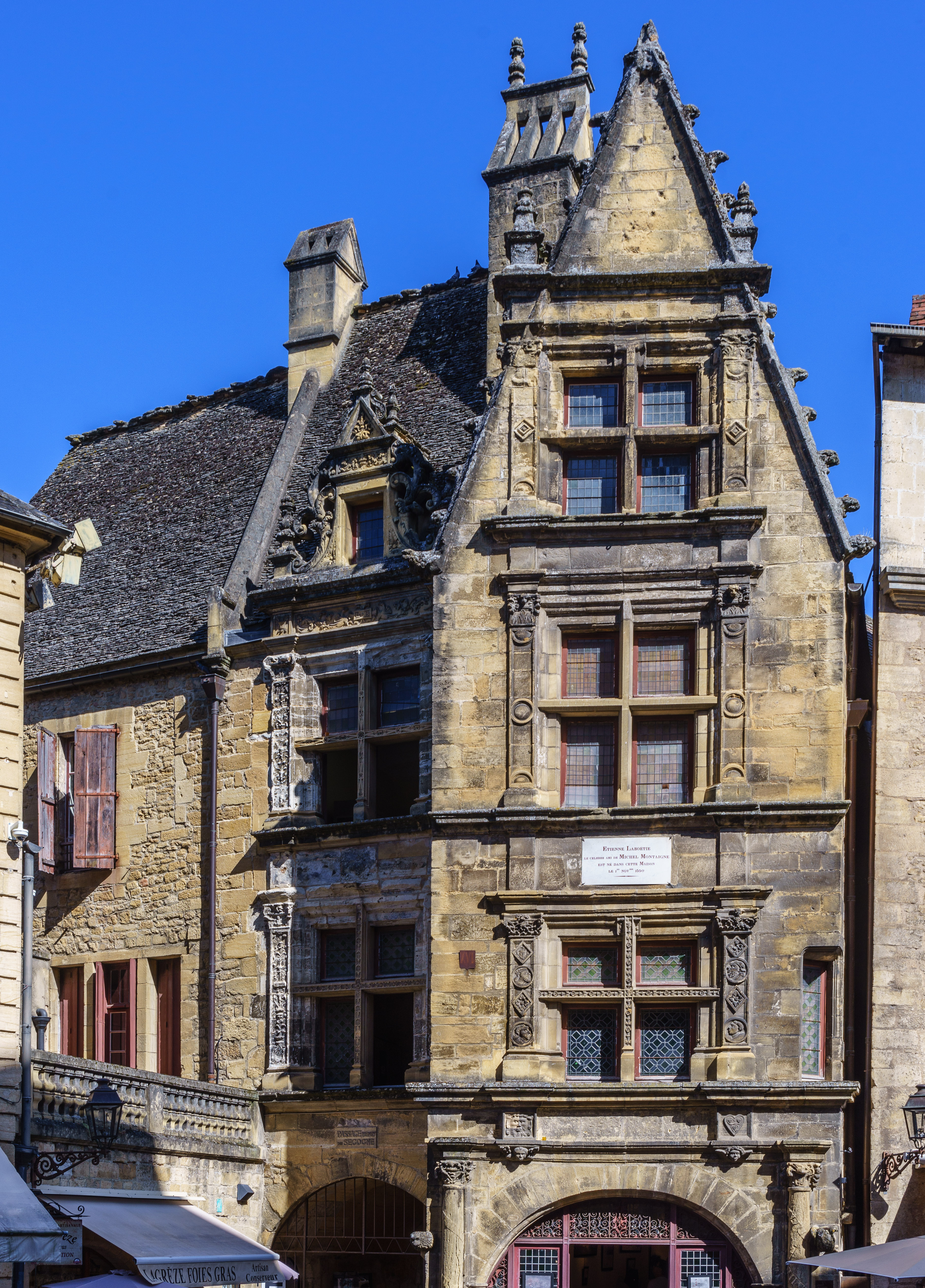 La maison natale de Etienne De La Boétie